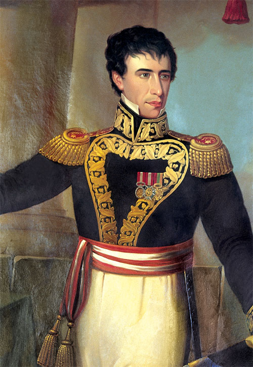 General Andrés de Santa Cruz, Protector de la Confederación Perú Boliviana